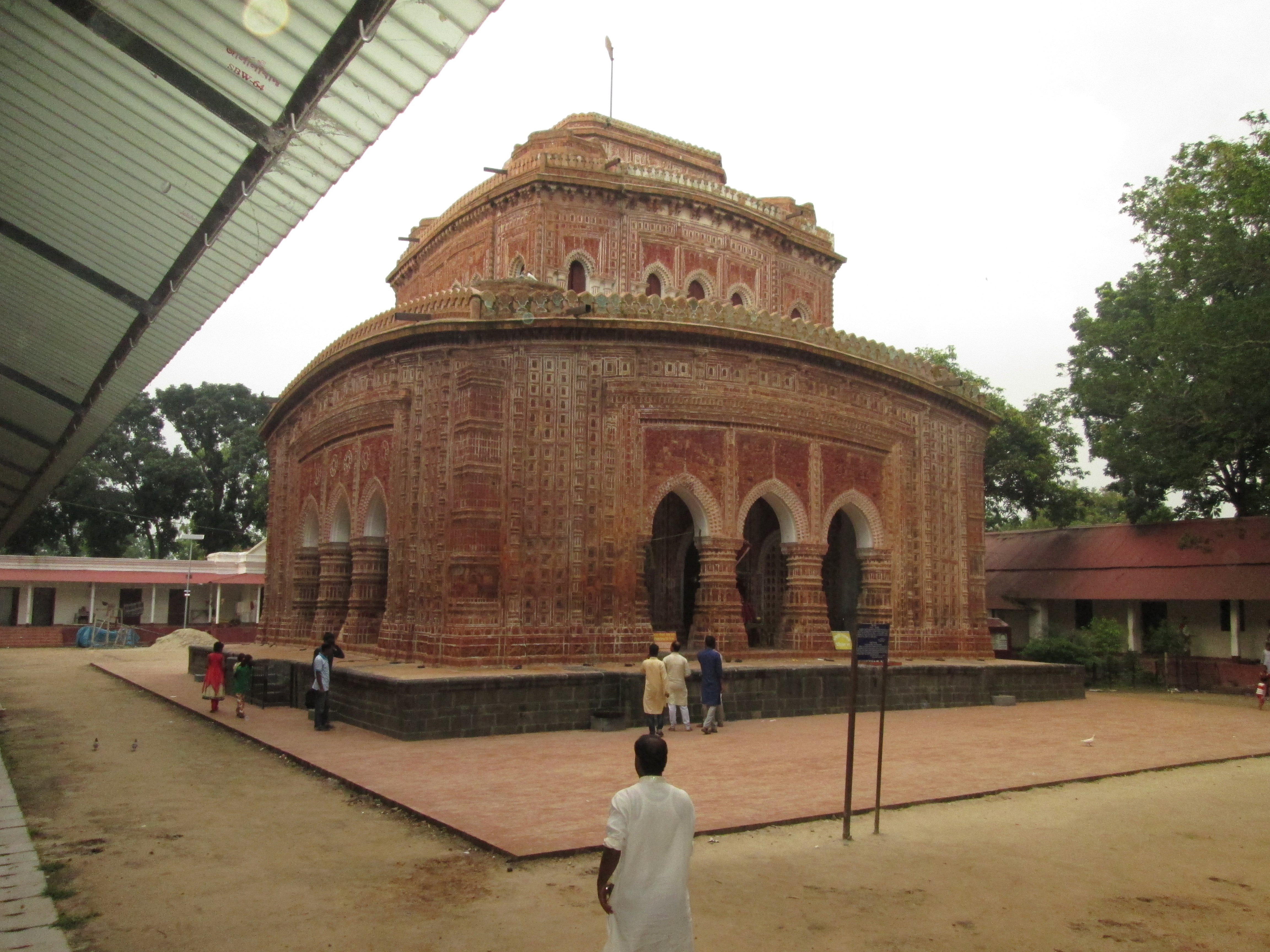 কান্তজীউ মন্দির